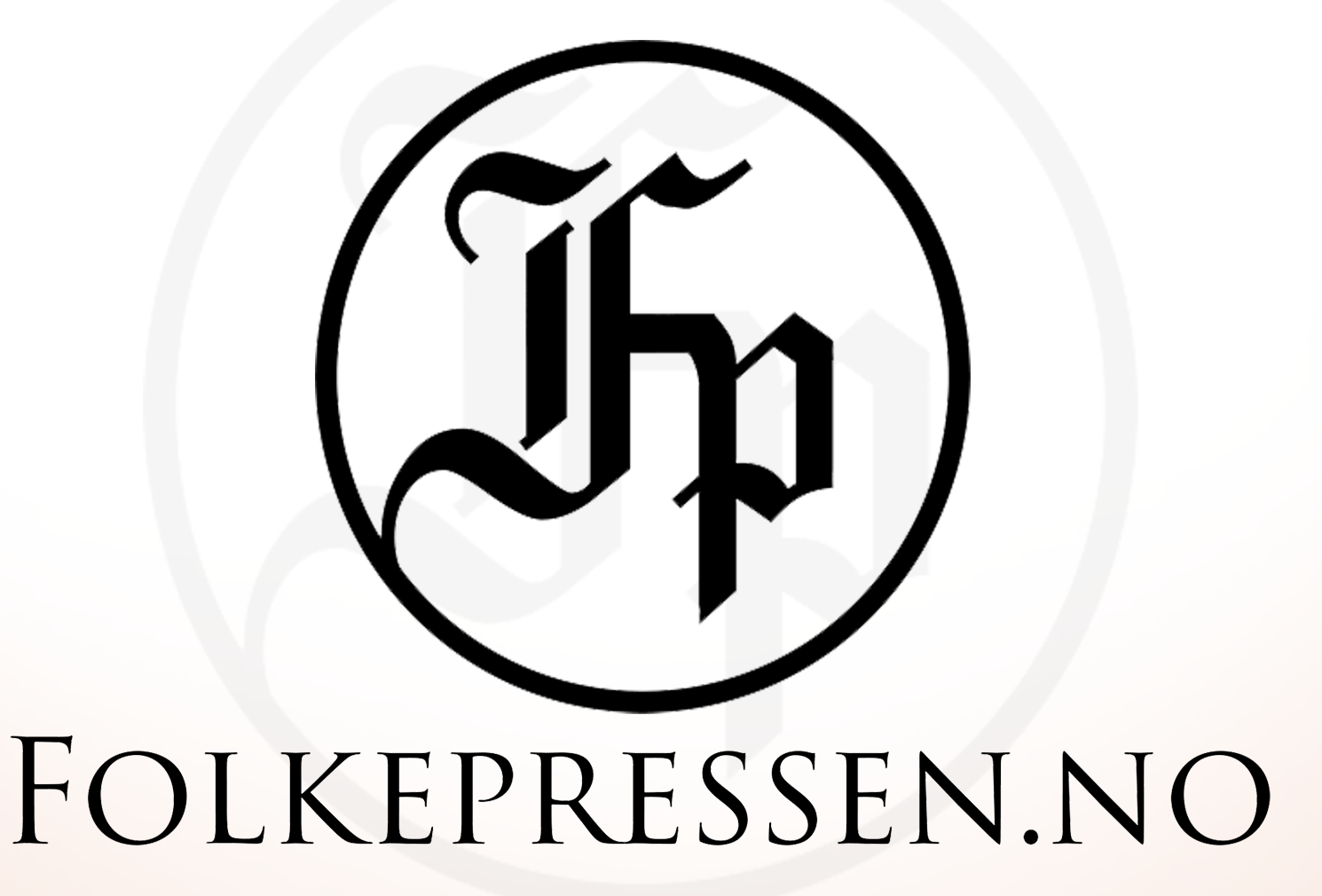 Logo for Nettmagasinet Folkepressen.no